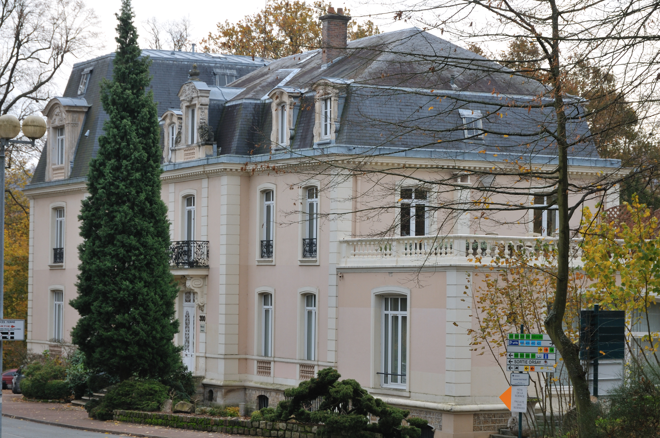 Château de la faculté des sciences, siège de la présidence de l'Université Paris-Sud XI, Orsay, Essonne, France